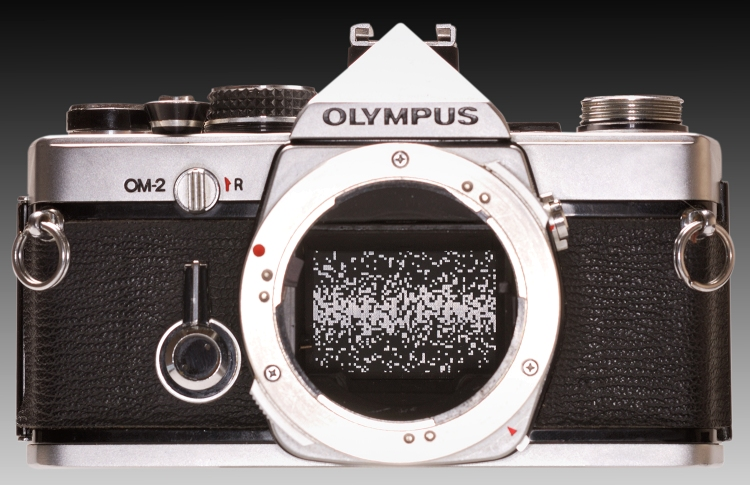 Olympus OM-2 Camera with locked mirror and visible Centre Weighted random pattern